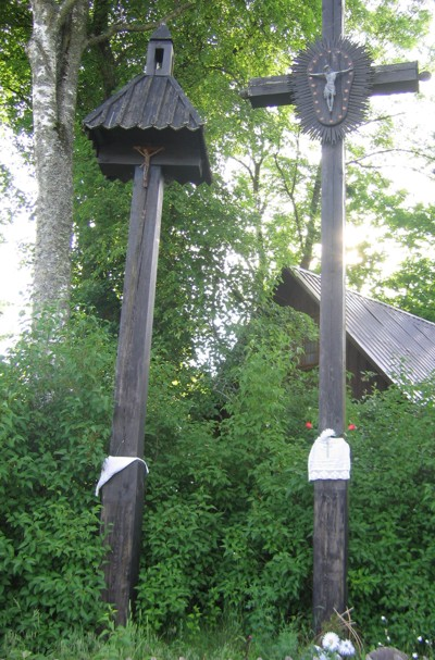 Autoriaus nuotrauka, 2005.06.23. Kryžiai Zervynų kaime. Nuotrauka gali būti platinama pagal GFDL licenciją.